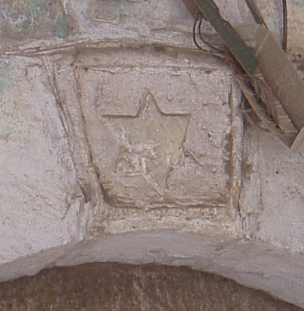 Summer 2005